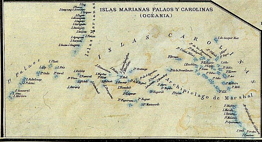 Islas Marianas, Palaos y Carolinas (Oceanía). Detalle de un Nuevo mapa de España y Portugal y de sus colonias, ilustrado con los 49 escudos de sus Provincias y con las 14 Decoraciones Militares, indicando todos los caminos de hierro, carreteras, ríos y canales, Escala 1/165000